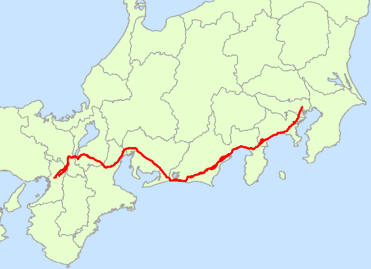 国道1号線の経路概略図